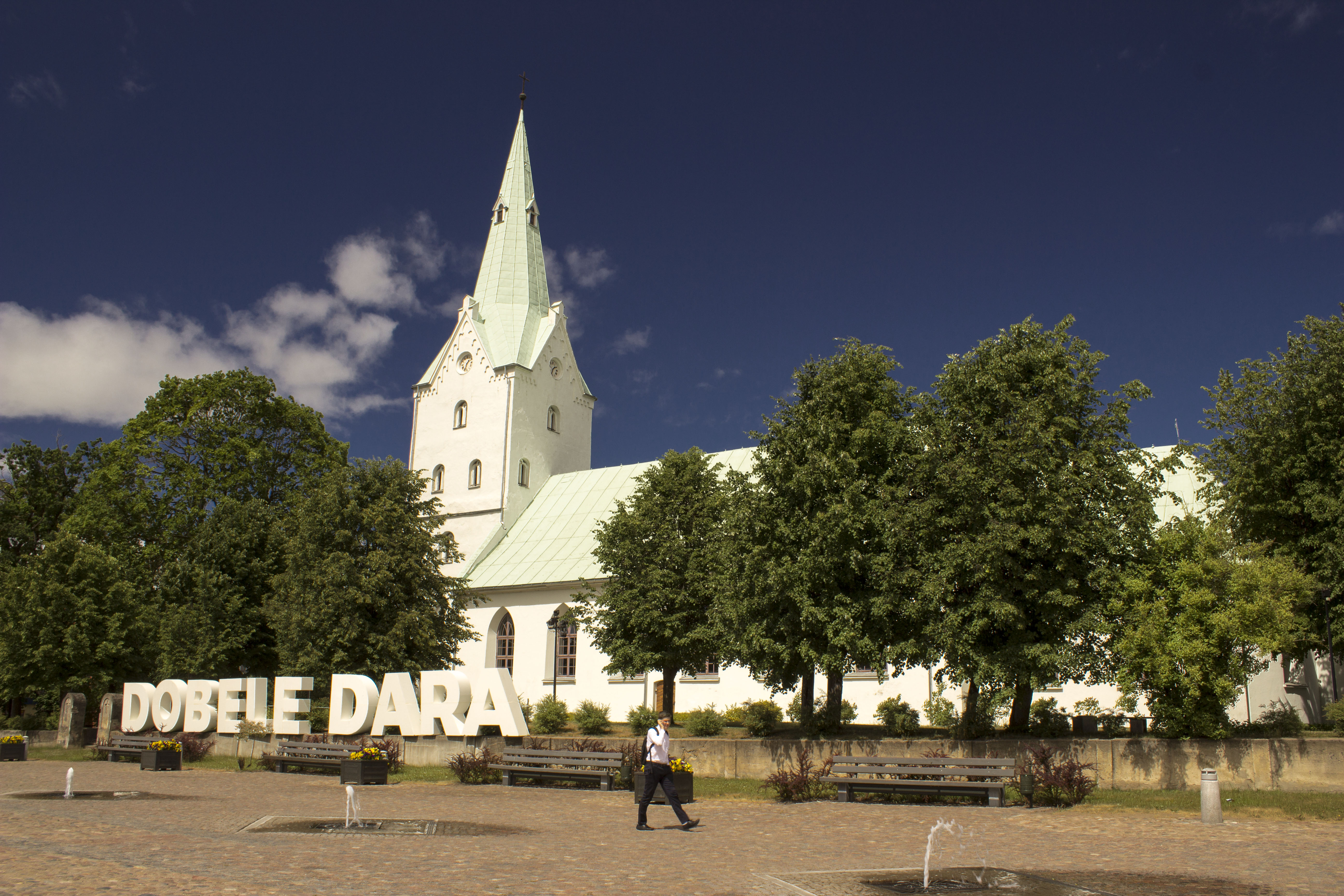 Dobeles luterāņu baznīca, Dobele, Baznīcas iela 1